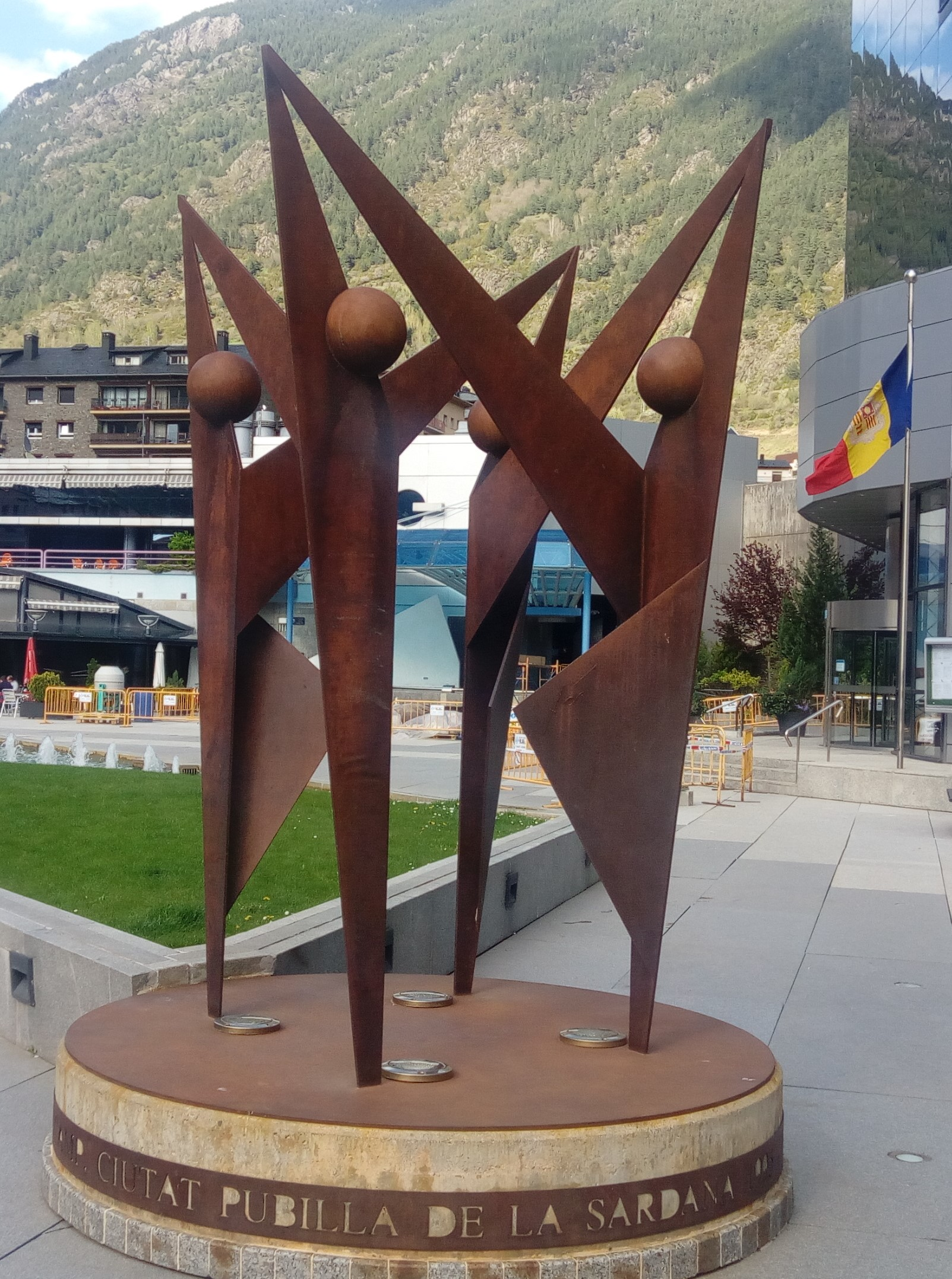 Encamp, ciutat pubilla de la sardana (1995). Josep Maria Xart